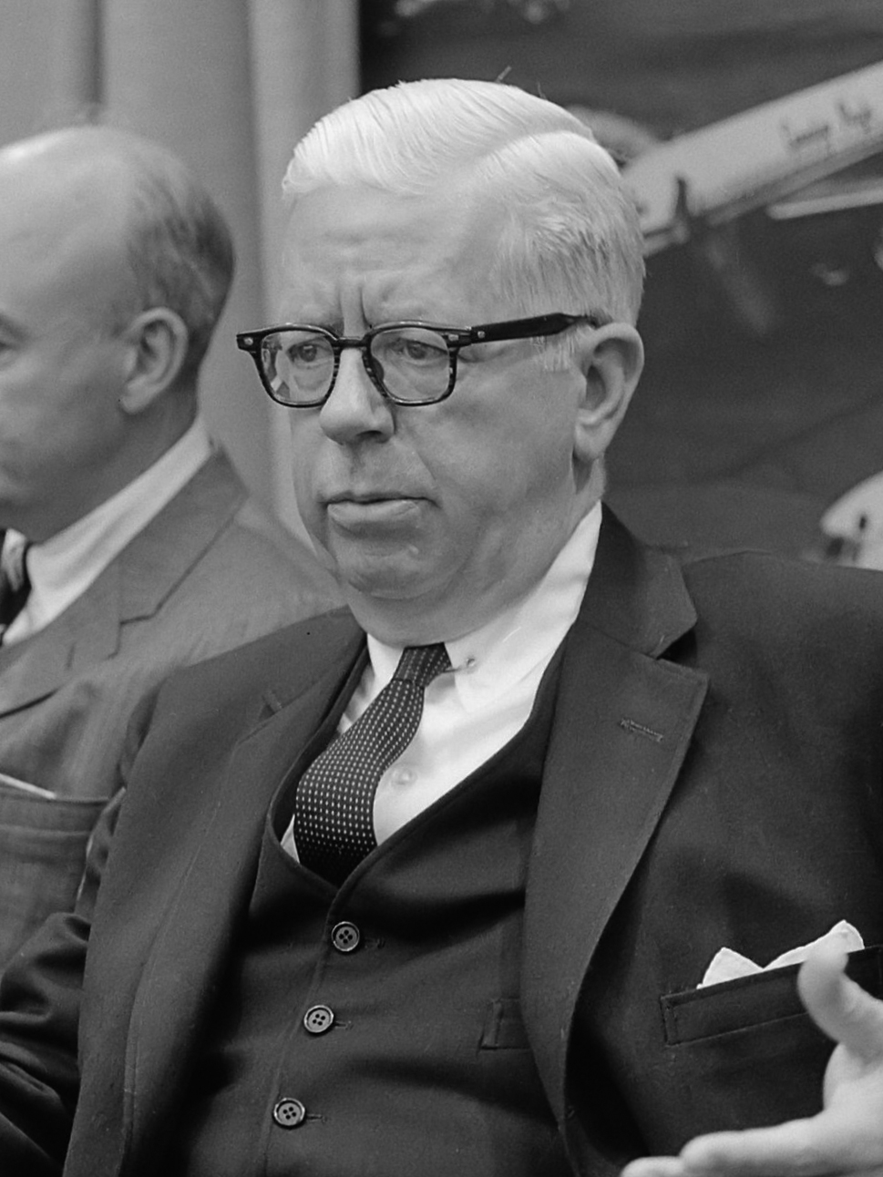 Minister H.H. Fowler op Schiphol 9 september 1965